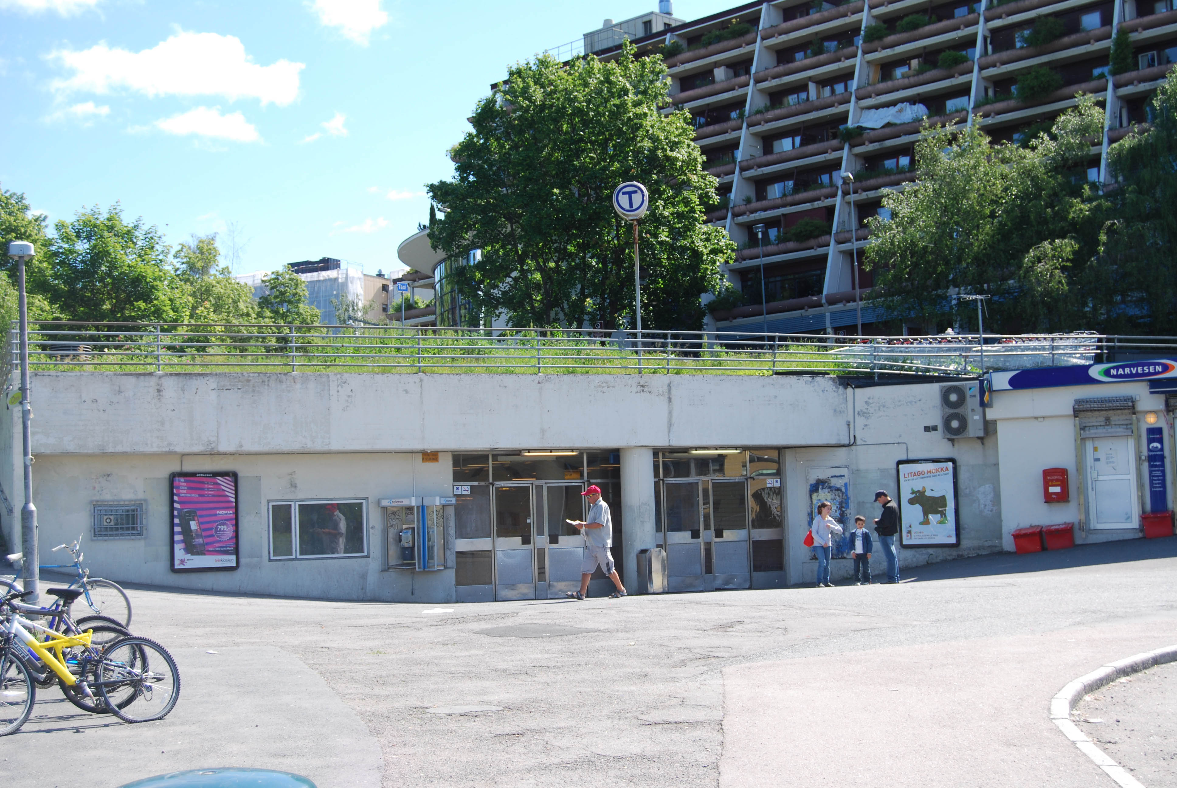 Stacja Stovner (Oslo) 2009 r.